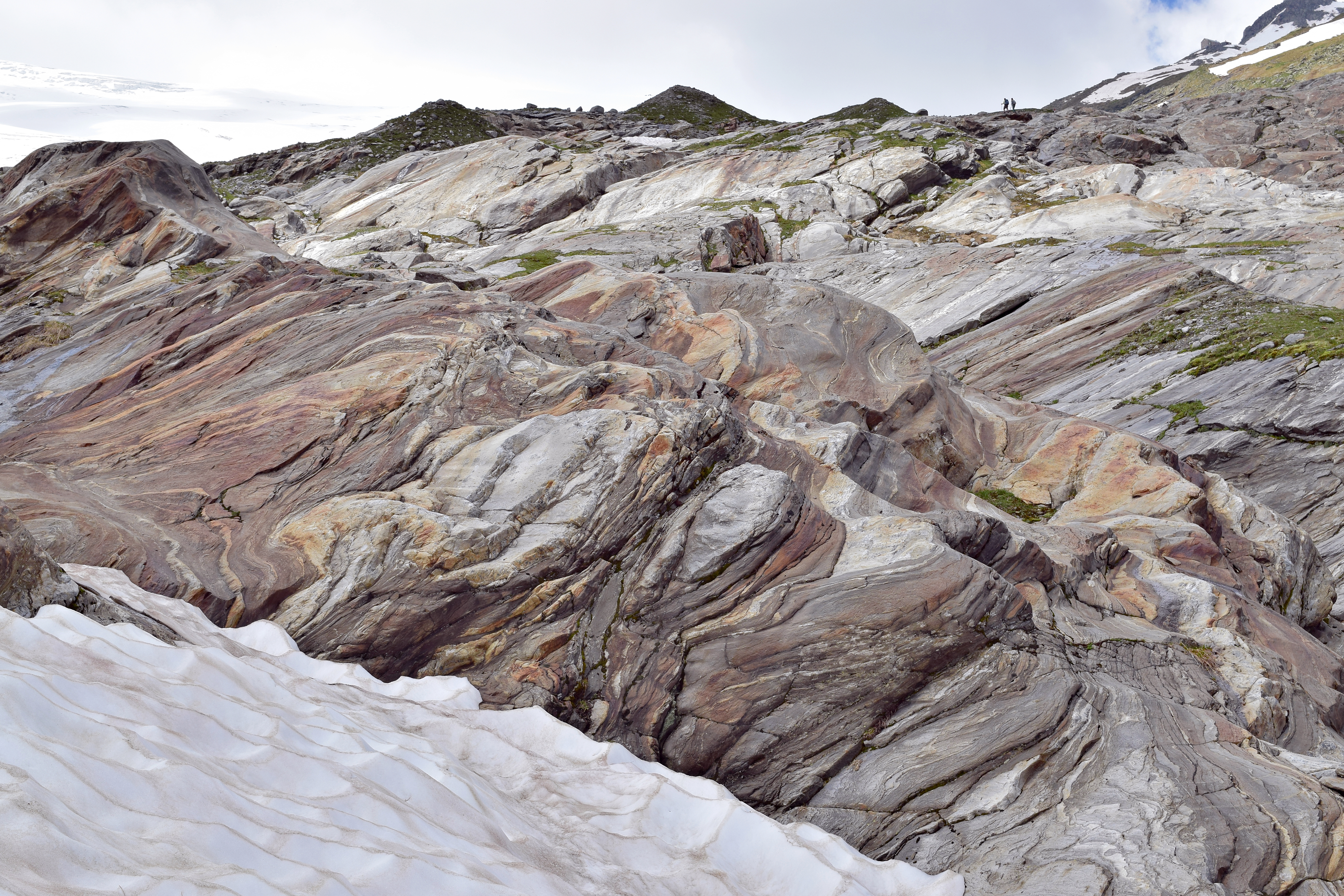 Der Weg führt über von Gletscherschliff des Schlatenkees gezeichnete anstehende Paragneise der Venedigerdecke (Tauernfenster). This file shows the National Park Hohe Tauern in Austria.